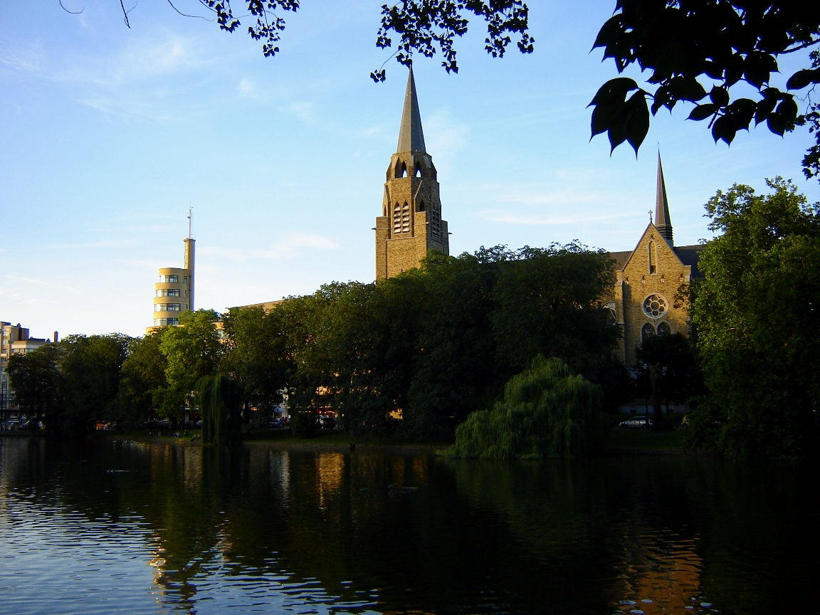 North Pond - Ixelles Ponds, Brussels, Belgium